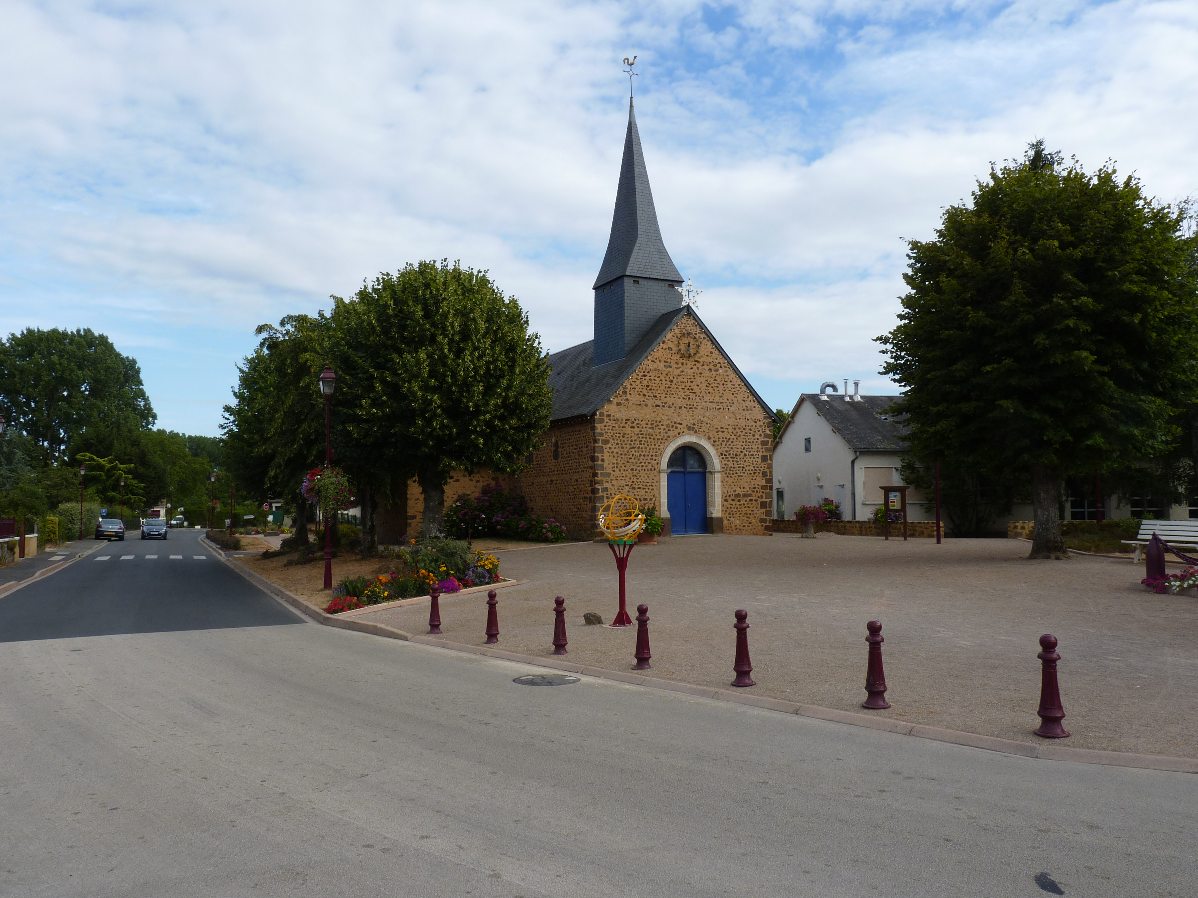 Sarthe - Souillé - Eglise Saint Martin